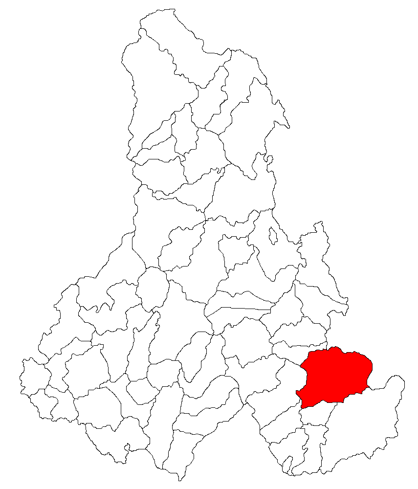 Categorie:Hărţi ale judeţului Harghita Contents 1 Licensing 2 Sursă 3 Licensing 4 Original upload log Licensing Sursă ro::Imagine:Harta_jud_Harghita.png